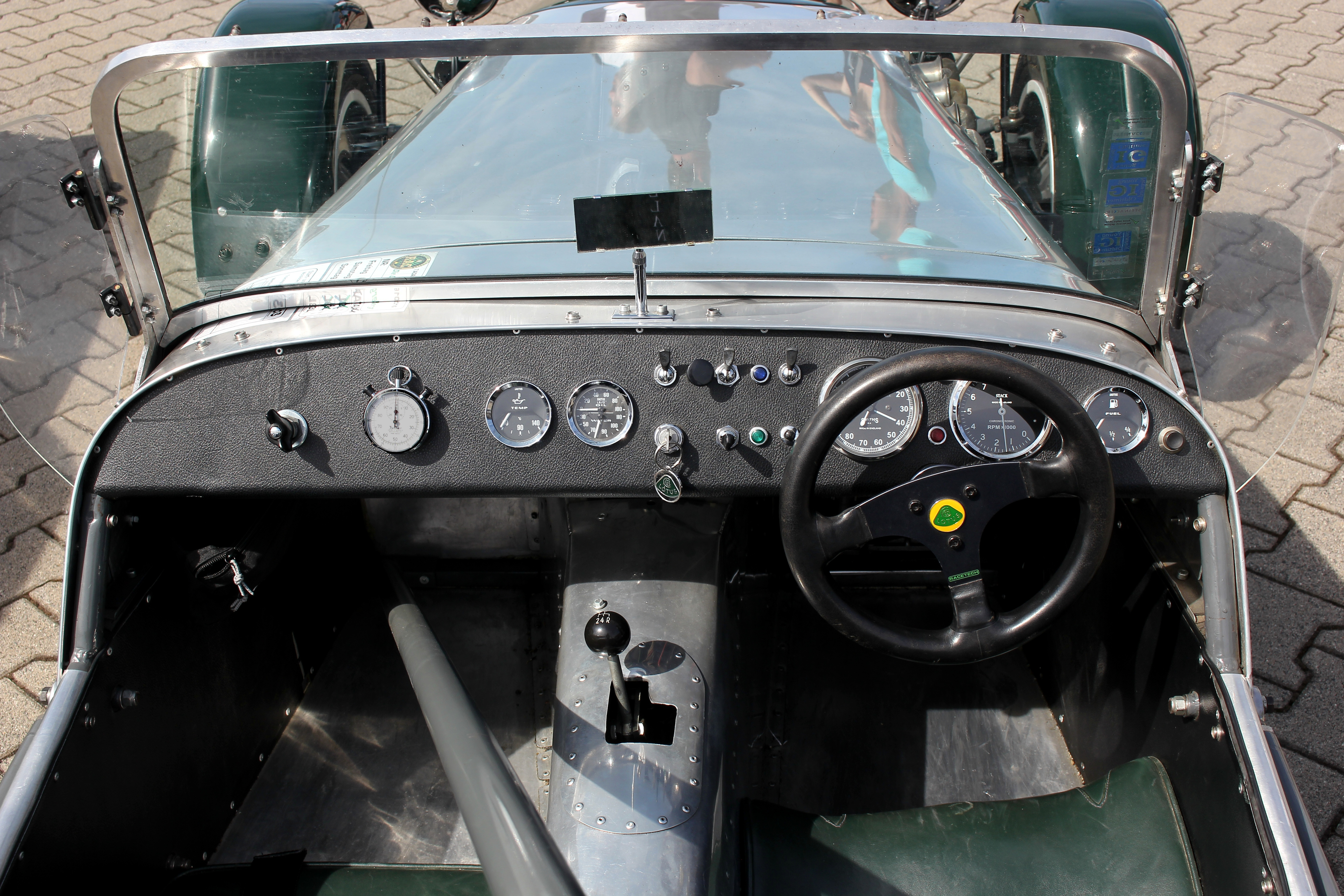 Cockpit eines Lotus Seven 3 S mit Twin-Cam-Motor von 1969